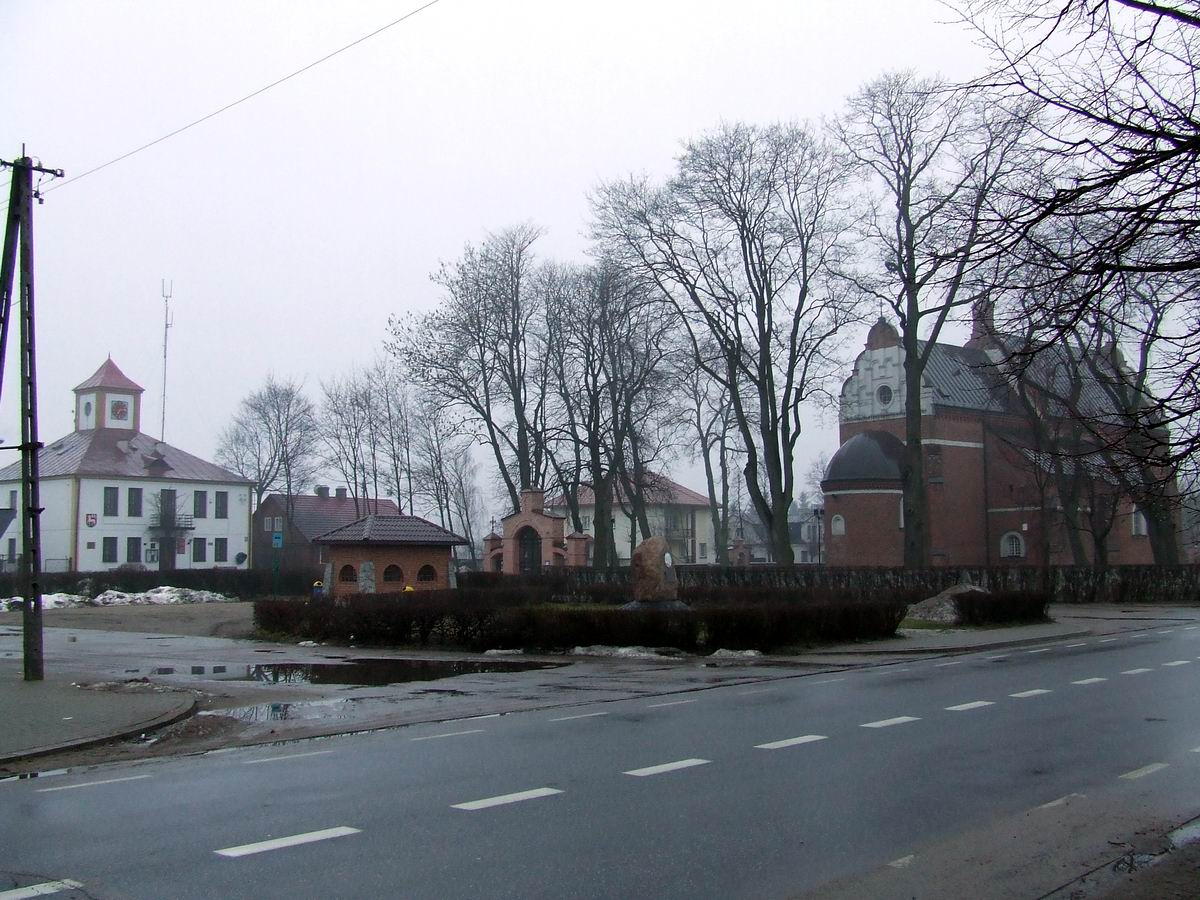 Rynek w Broku, w tle ratusz, po prawej fara, pośrodku pomnik .